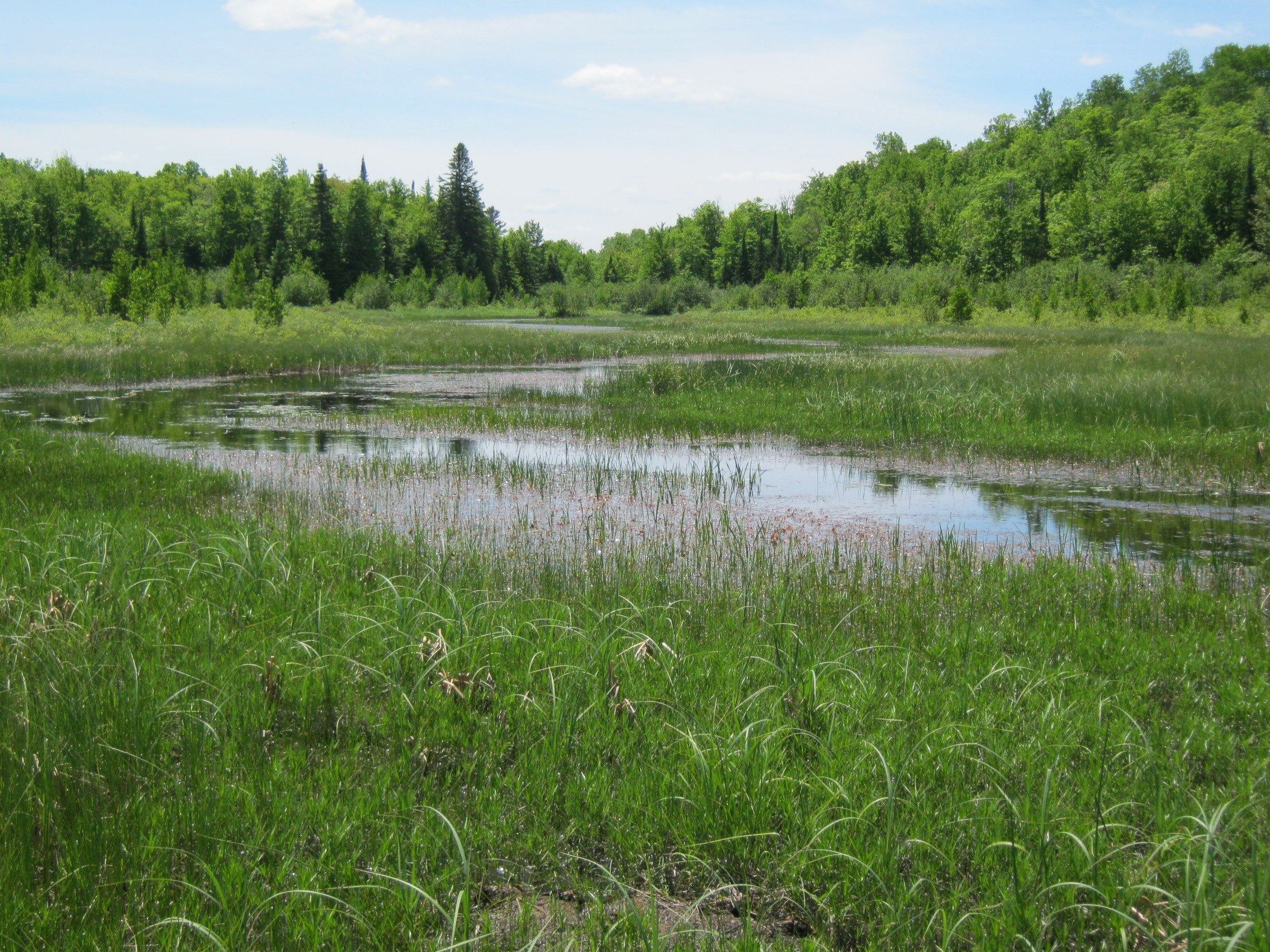 Penokee wetland